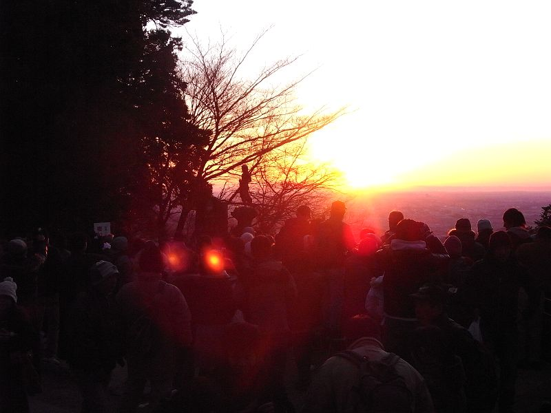 高尾山駅 十一丁目茶屋